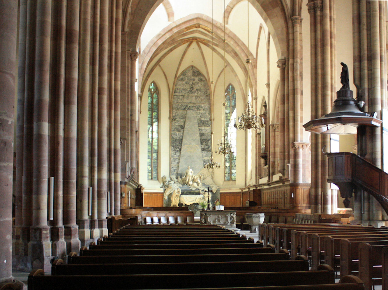 St Thomas est l'Eglise protestante principale à Strasbourg. Son orgue a une réputation internationale et a été joué une fois par Wolfgang Amadeus Mozart.